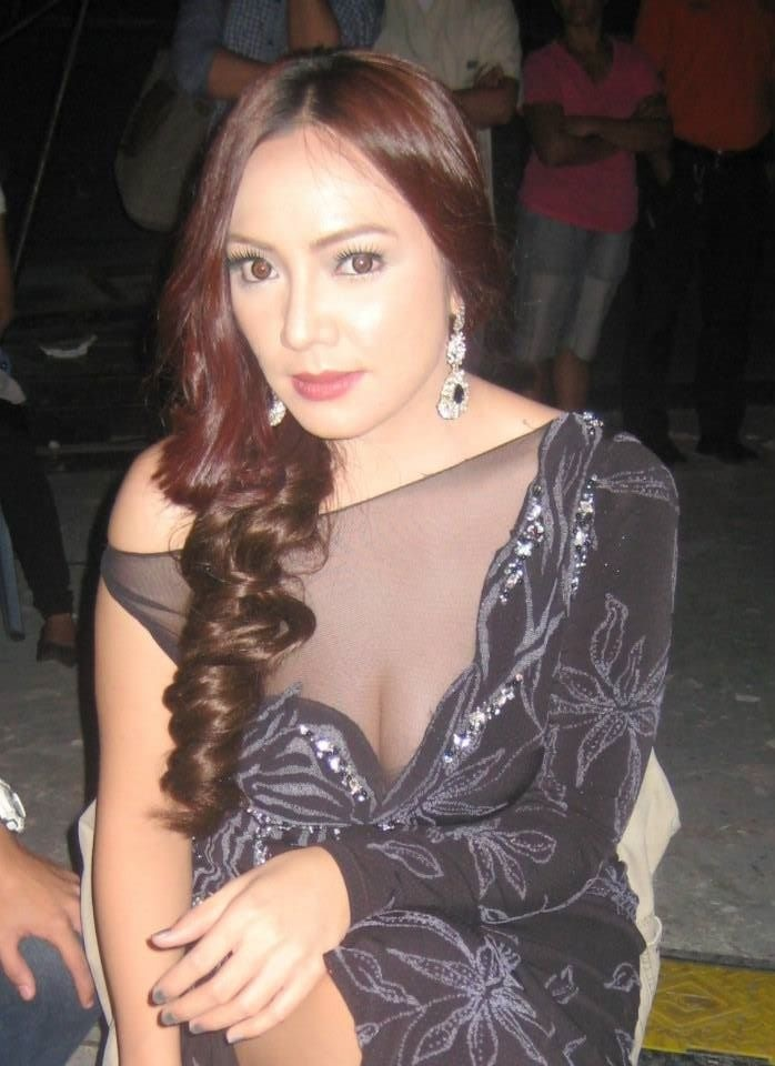 Walang tulugan 18th year anniversary